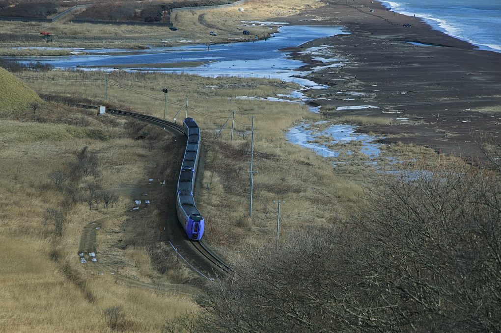 JR Hokkaido Nemuro Main Line, during Shakubetsu and Ombetsu.